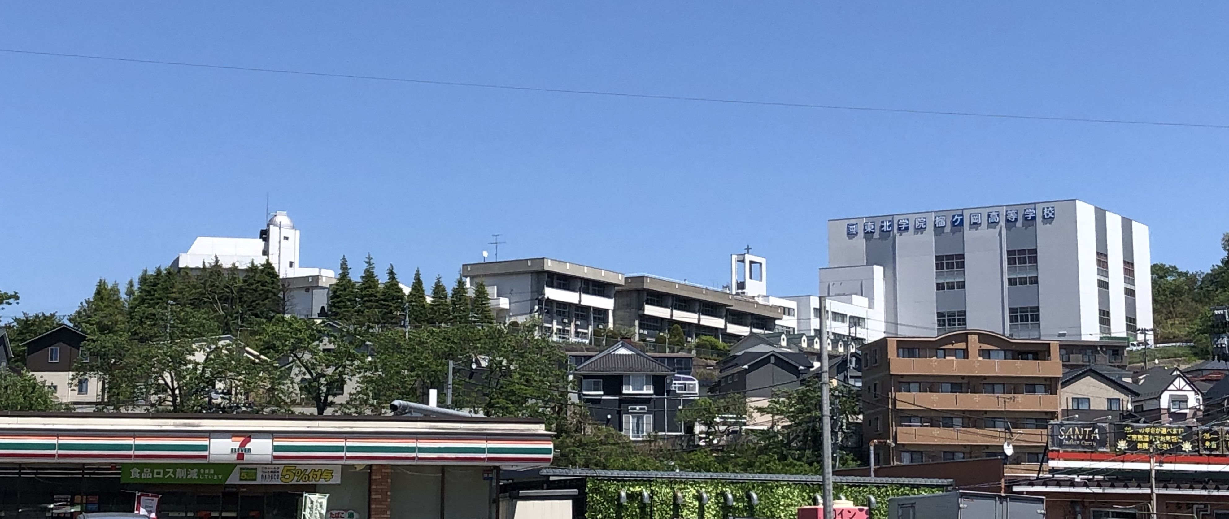 東北学院榴ケ岡高等学校 遠景